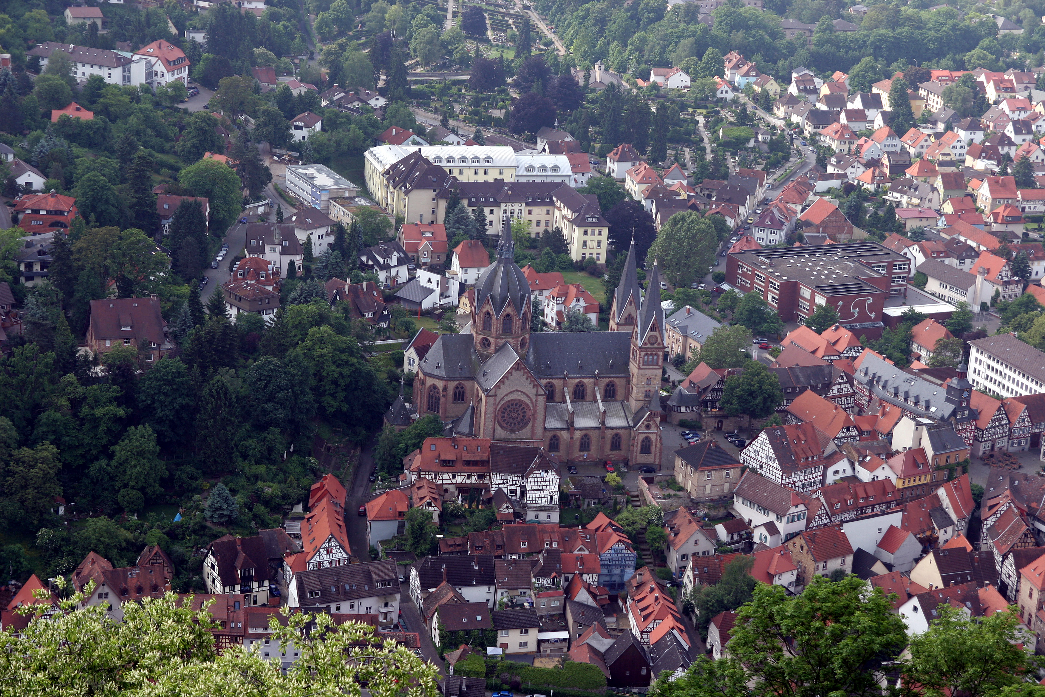 Blick auf die St. Peter Kirche ("Dom der Bergstraße") der Stadt Heppenheim (Bergstraße) von der Starkenburg aus.